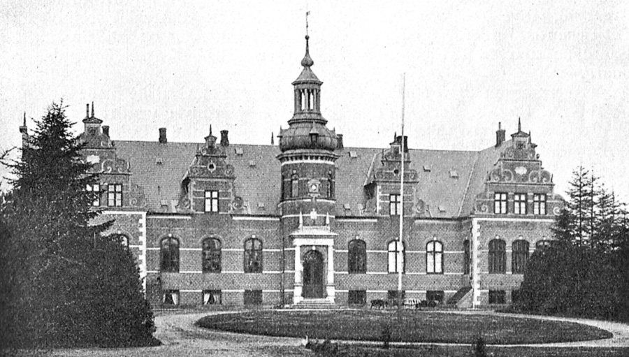 Fårevejle er en gammel sædegård, den nævnes første gang ca. 1326. Fårevejle ligger i Skrøbelev Sogn, Langelands Nørre Herred, Rudkøbing Kommune. Hovedbygningen er opført i 1868 ved A. H. Klein, men er genopført efter en brand i 1870